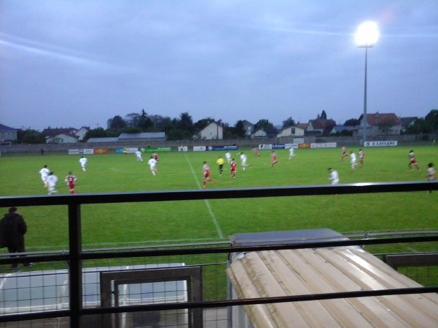 Match de football entre le SO Châtellerault et le FC Bressuire au stade de la Montée Rouge à Châtellerault (86100, France), le 14 mai 2016.